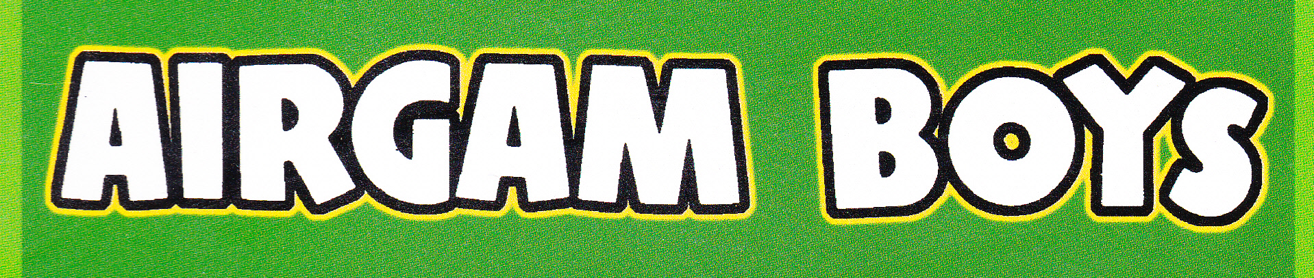 La Marque AIRGAM BOYS